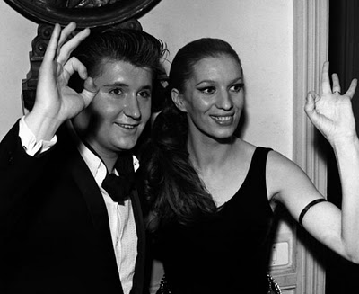 Iva Zanicchi e Bobby Solo vincitori a Sanremo 1969.